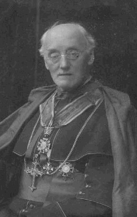 Jan Pospíšil (1837 - 1918), Český římskokatolický kněz.